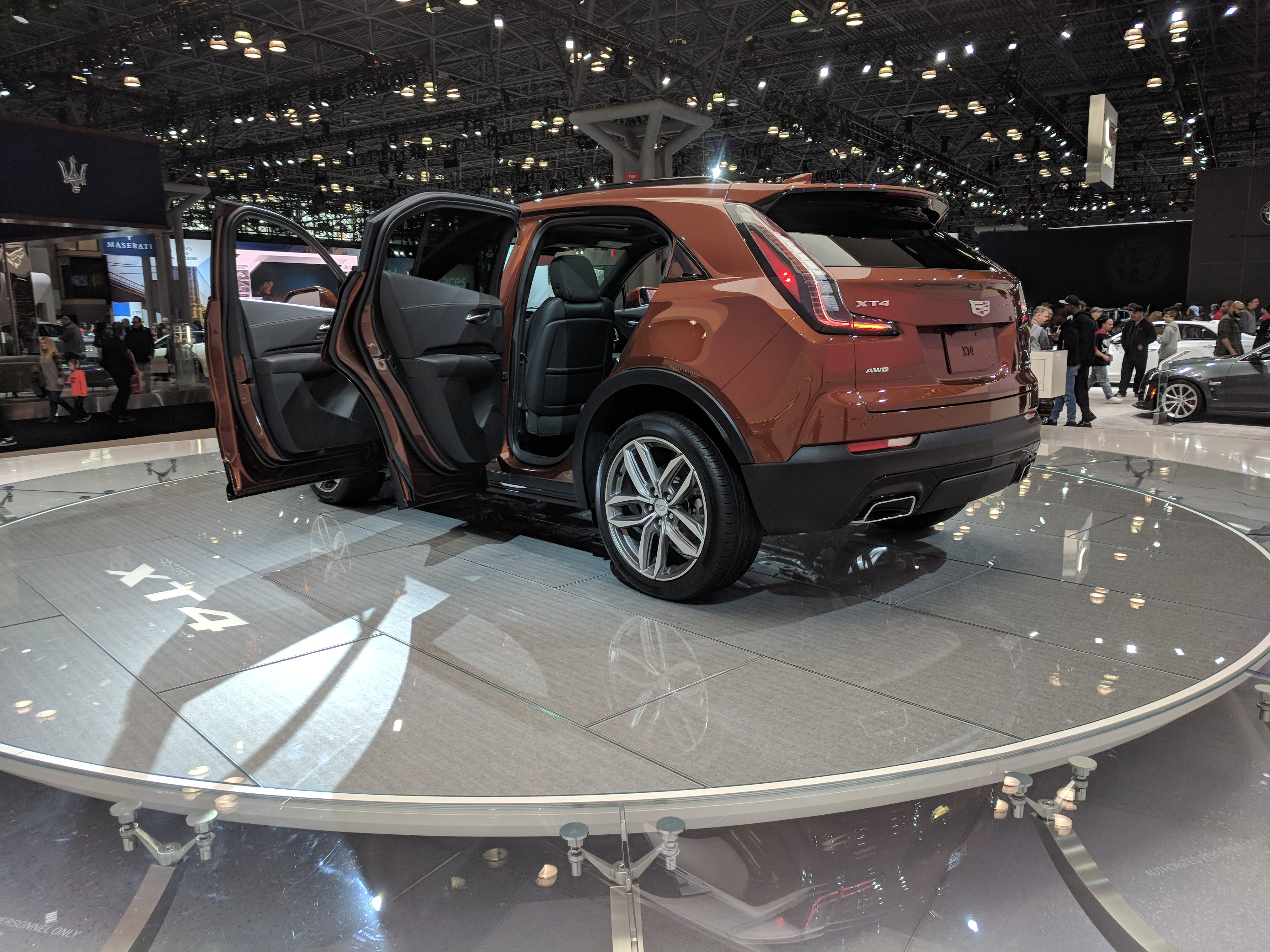 Cadillac XT4